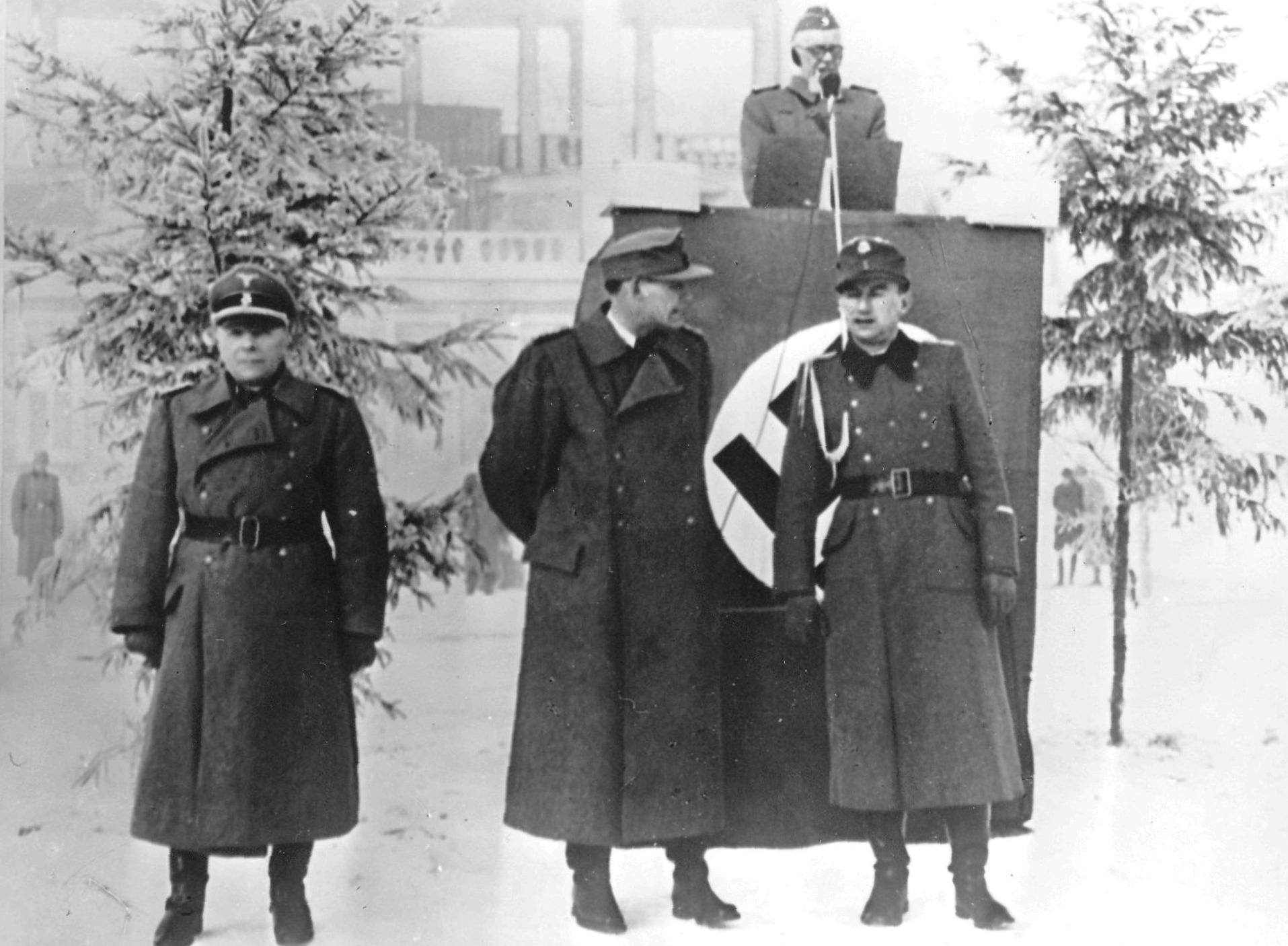 Leon Rupnik med govorom.